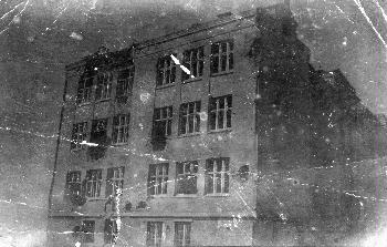 Kansalaissodan taistelun jälkiä Tammelan koulurakennuksessa Tampereella.